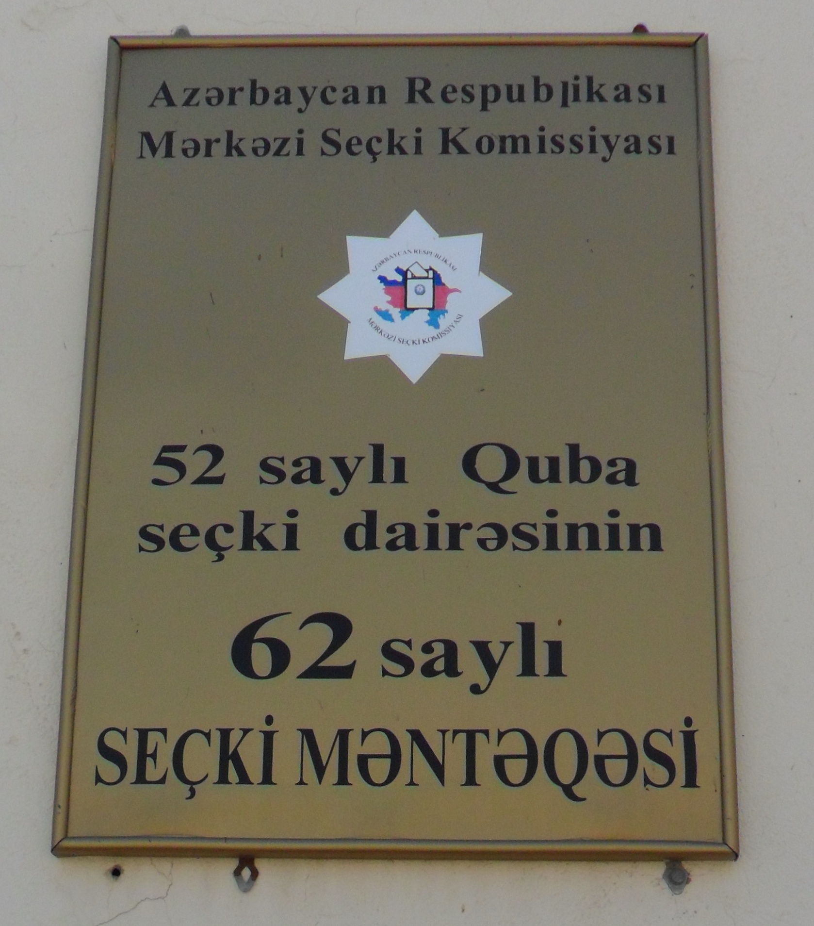 52 saylı Quba seçki dairəsinin 62 saylı seçki məntəqəsi (Əlik kəndi)